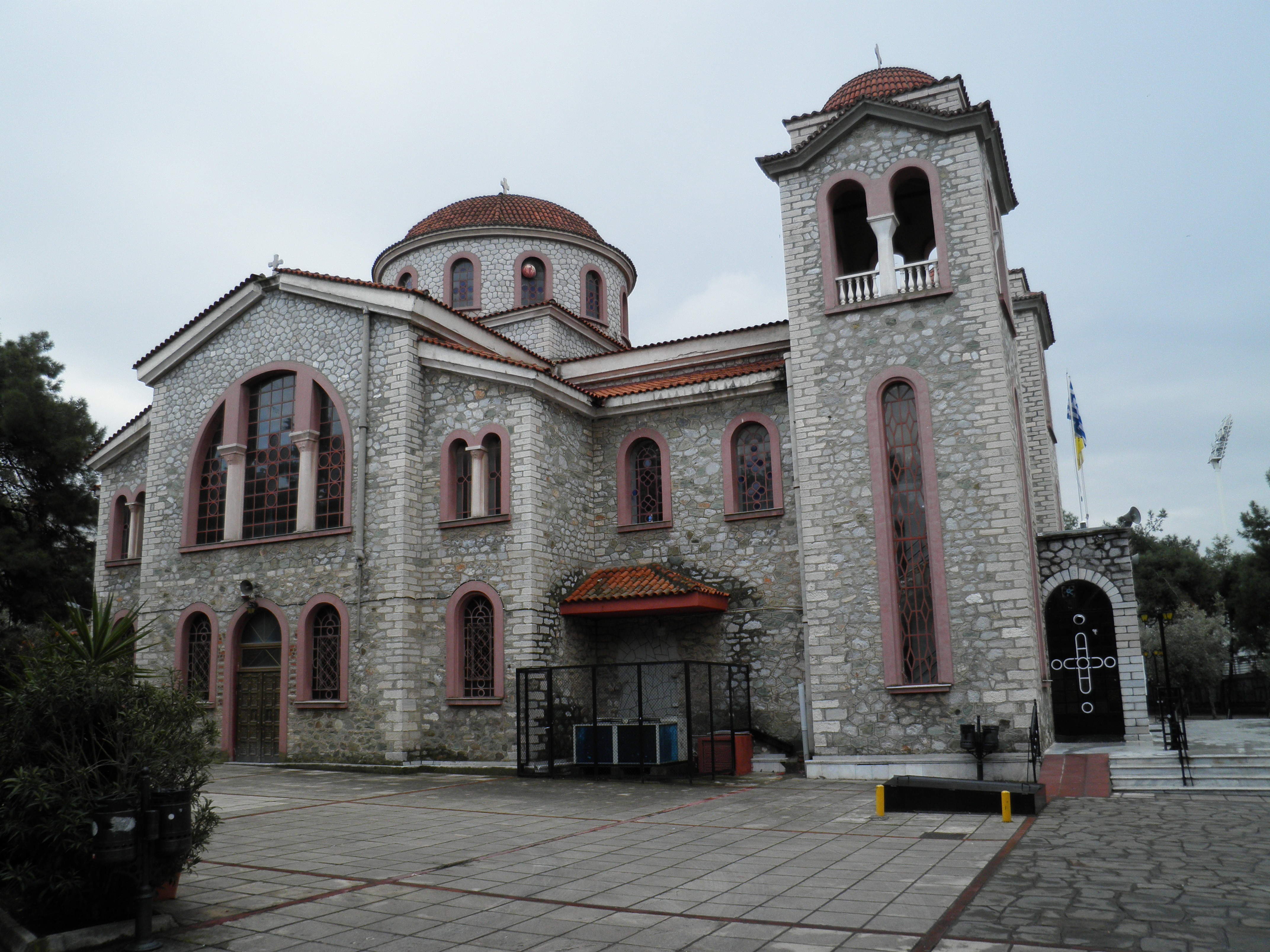 Crkva Sv. Varvare